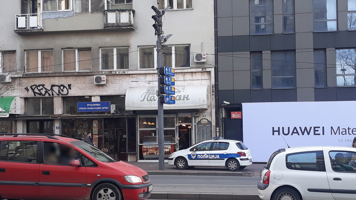 Посластичарница „Пеливан“, Београд